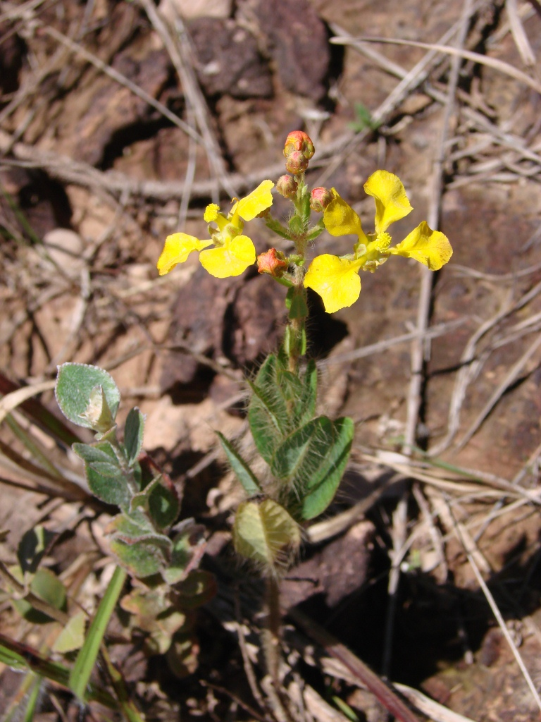 Camarea hirsuta A.St.-Hil. - MALPIGHIACEAE - Poço Azul - Brazlândia - Distrito Federal - Brasil.